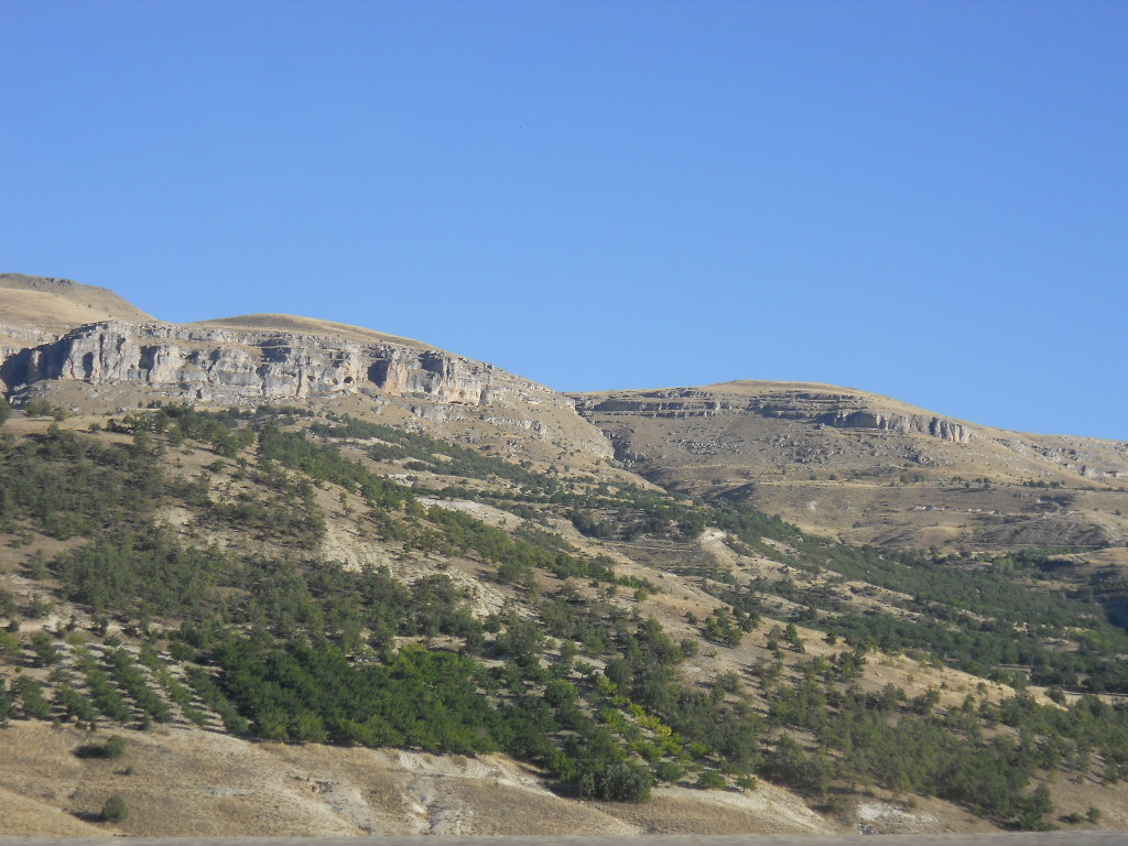 Malatya ili Akçadağ ilçesi yakınlarından bir görünüm.